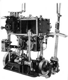 Original-Maschine Dampfschiff Greif